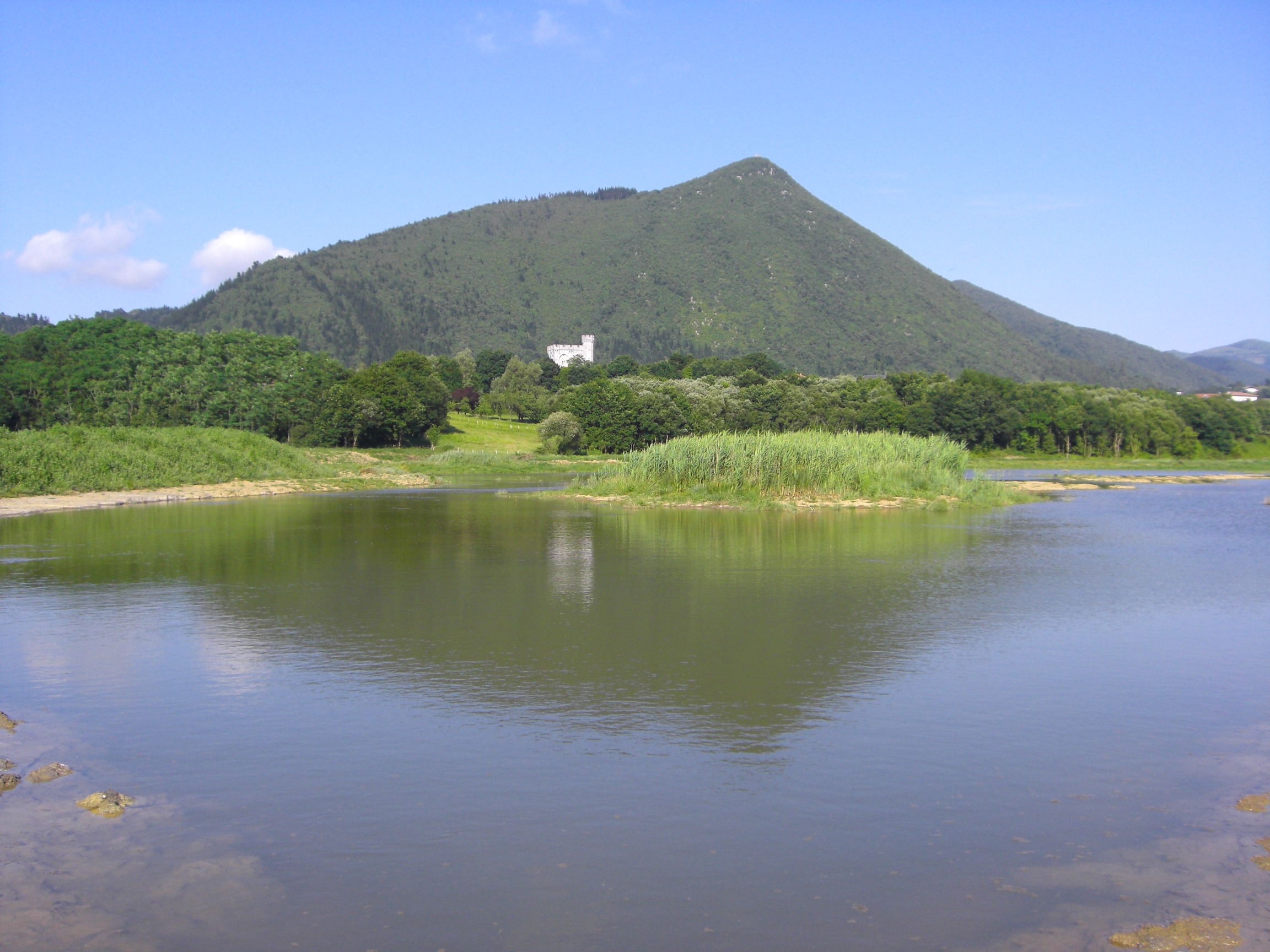 Laguna salobre creada en el marco de un proyecto de mejora ambiental en las marismas de Gautegiz-Arteaga